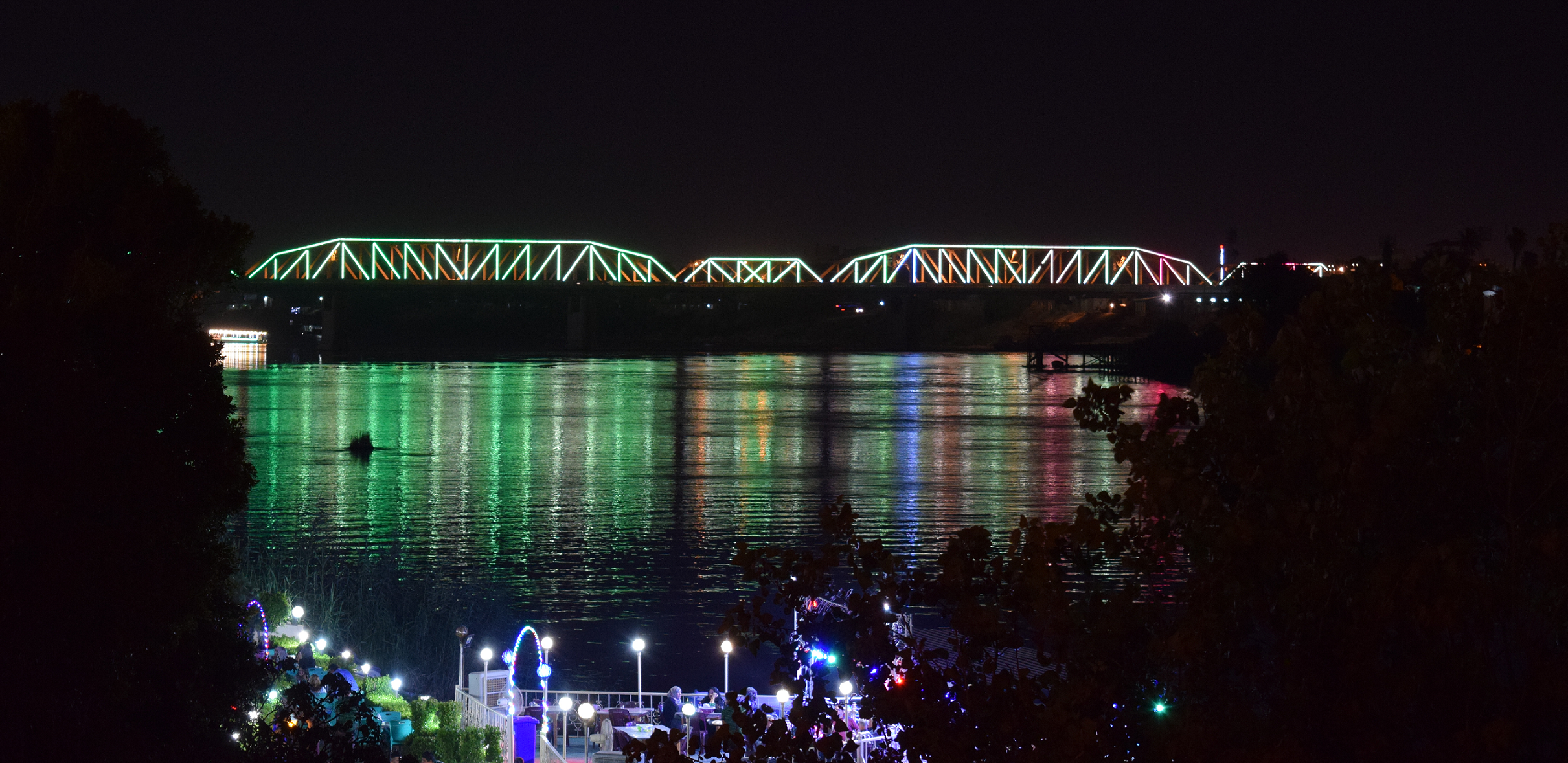 صورة لجسر الصرافية في بغداد على نهر دجلة في الليل، العطيفية، بغداد، العراق